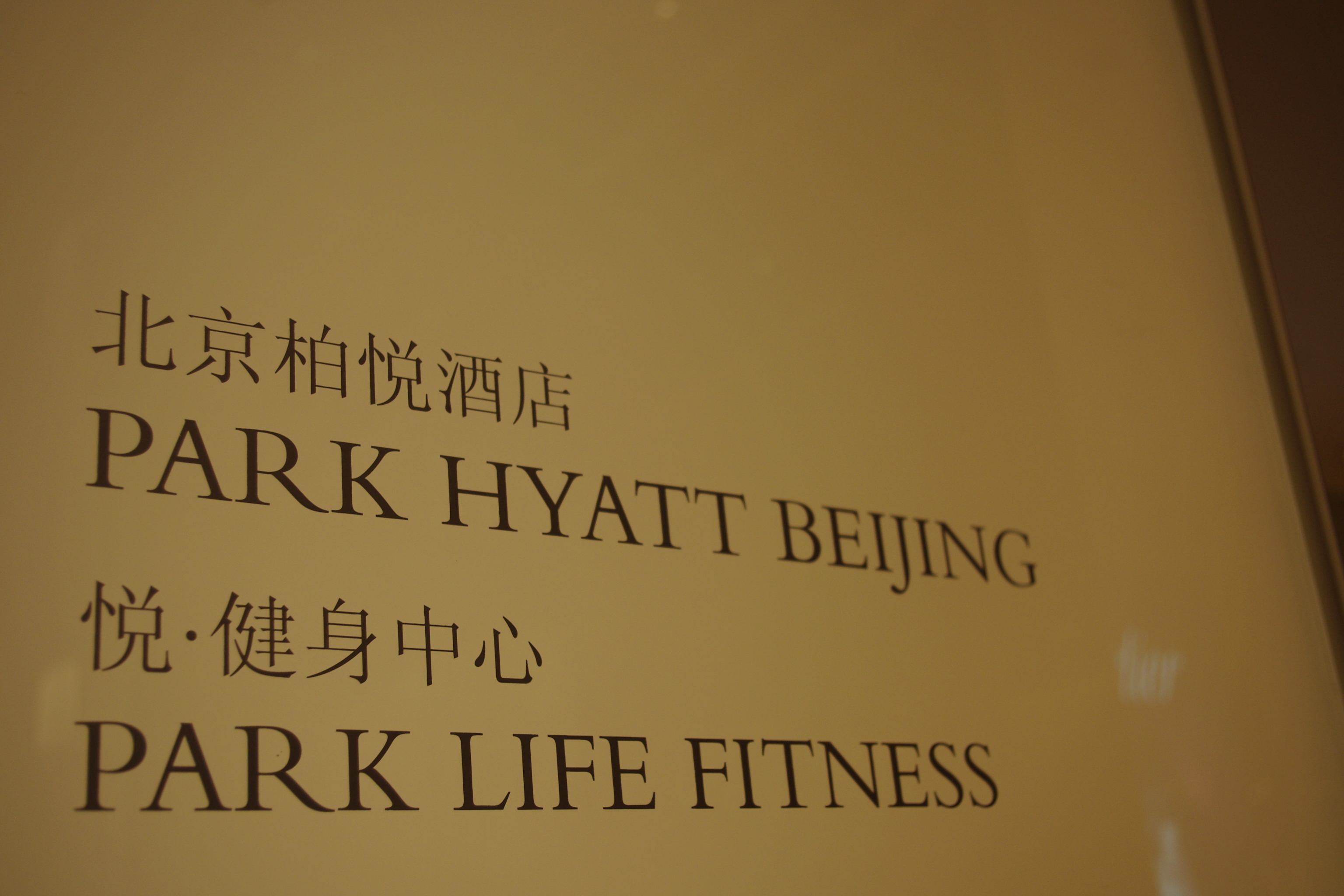 Park Hyatt Beijing